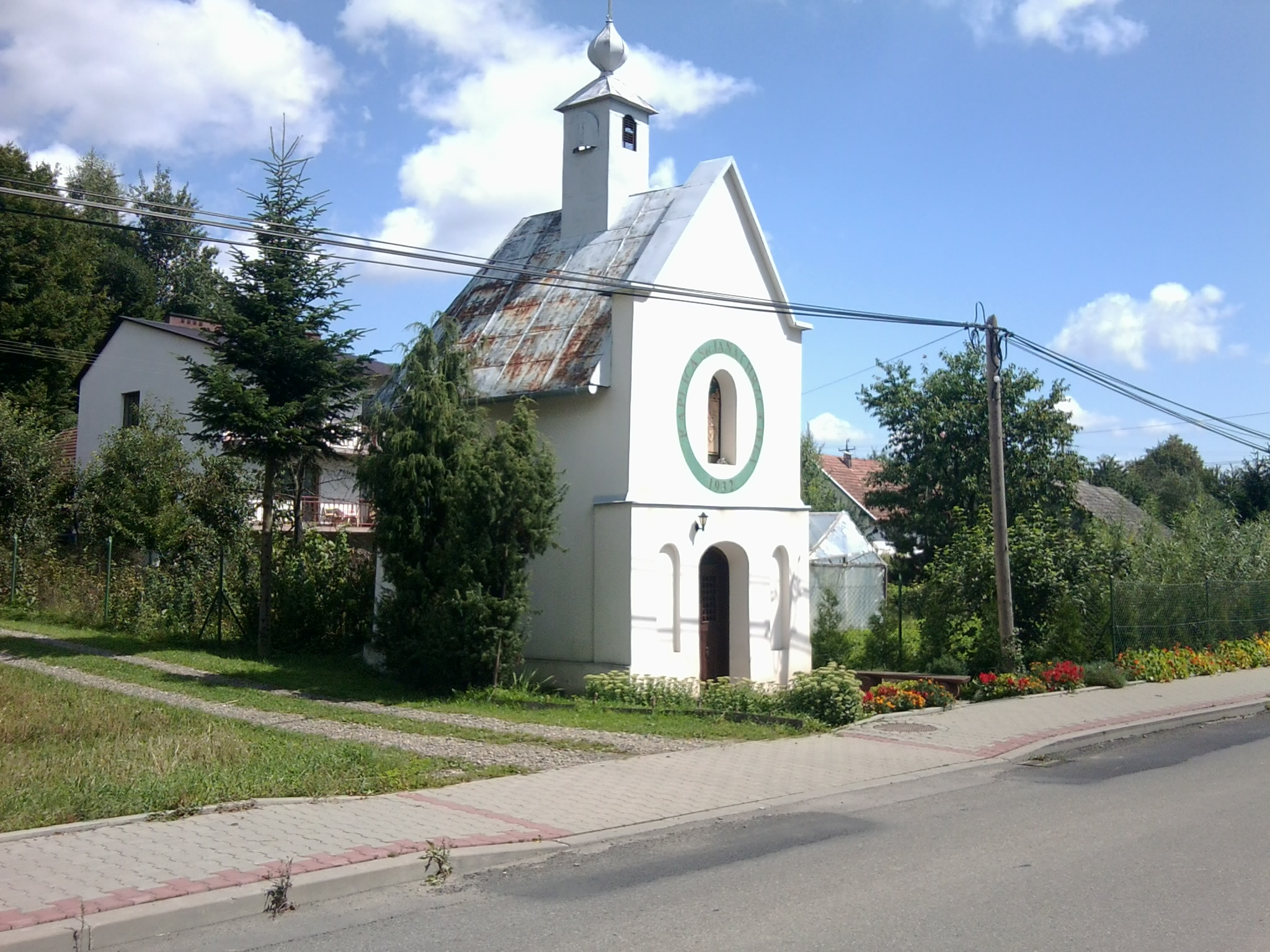 Kaplica św. Jana w Olszance(województwo małopolskie)